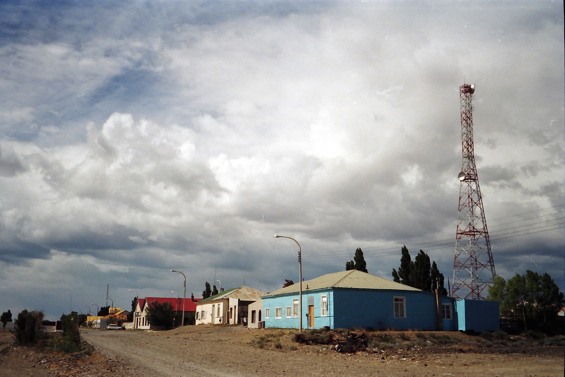 Puerto Santa Cruz. Foto de enero de 1996